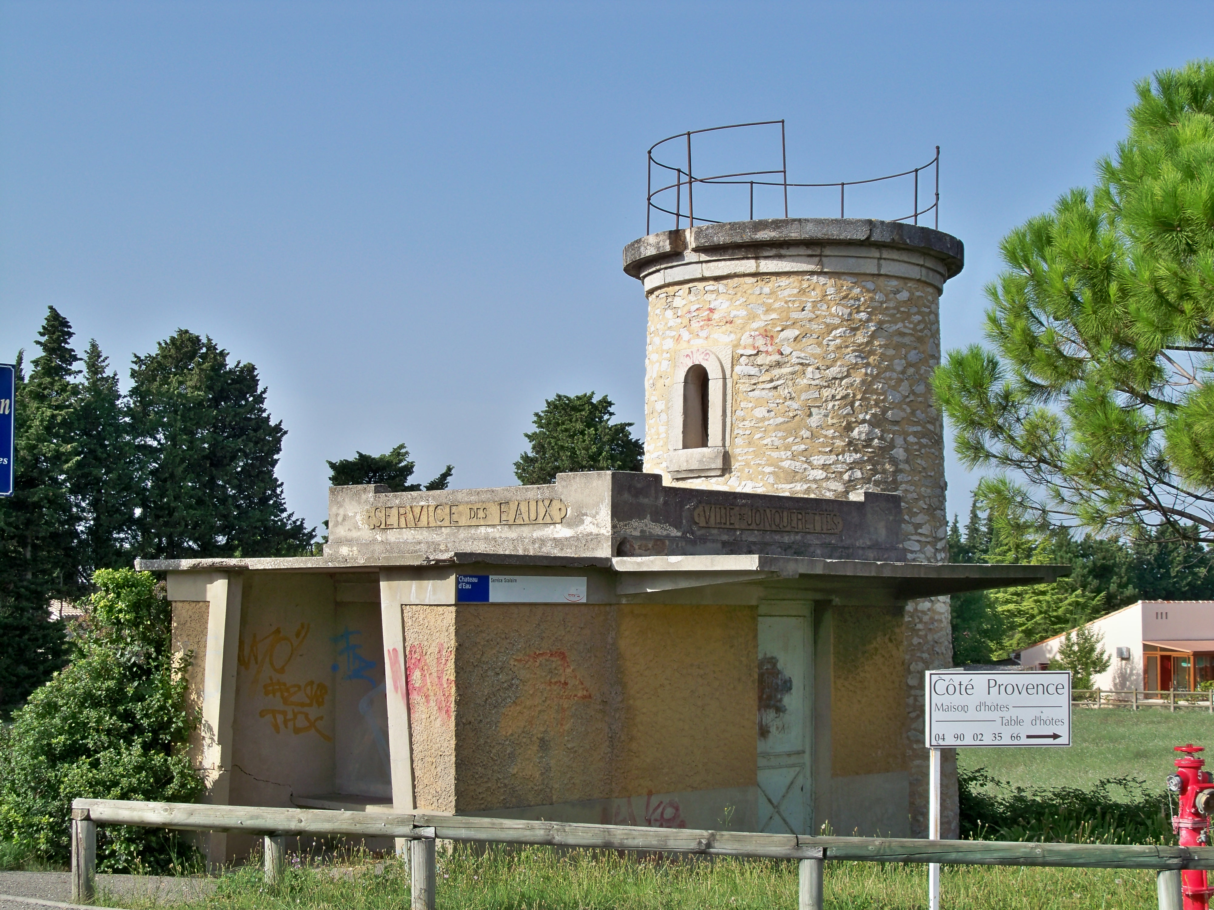 Batiments du service des eaux à Jonquerettes (84)